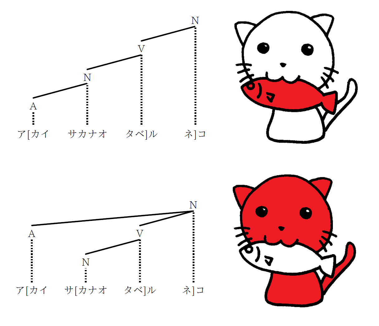 「赤い魚を食べる猫」という名詞句は、2通りに解釈できる。そしてこれらは句音調によって発音しわけることができる。